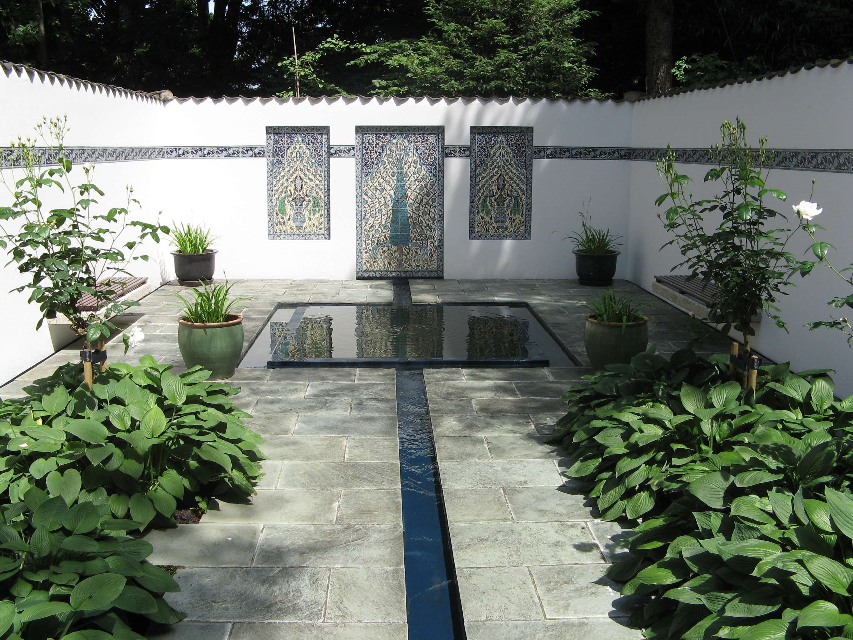 Rozentuin PT